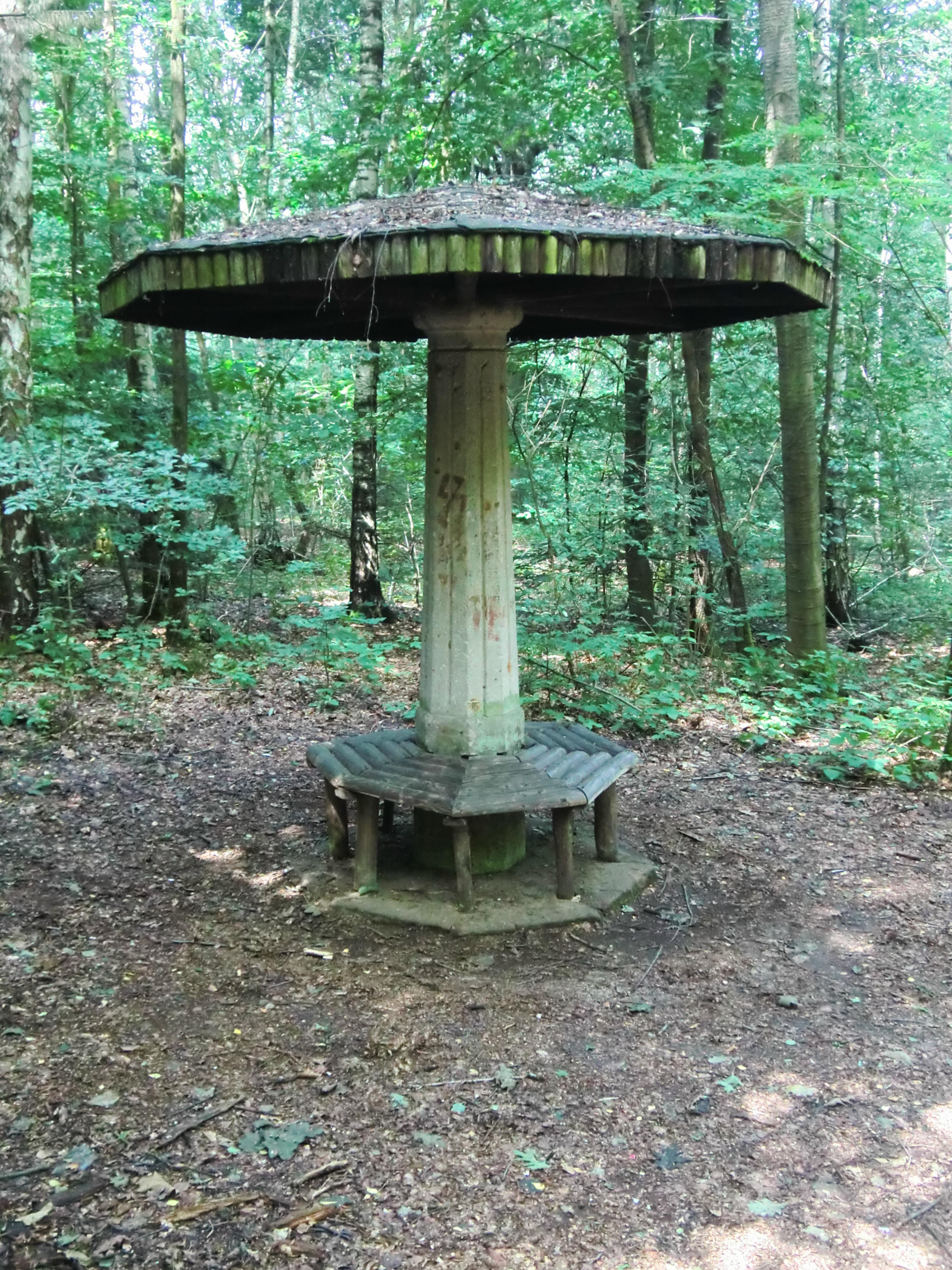 Dresdner Heide-Pilzdenkmal 2016